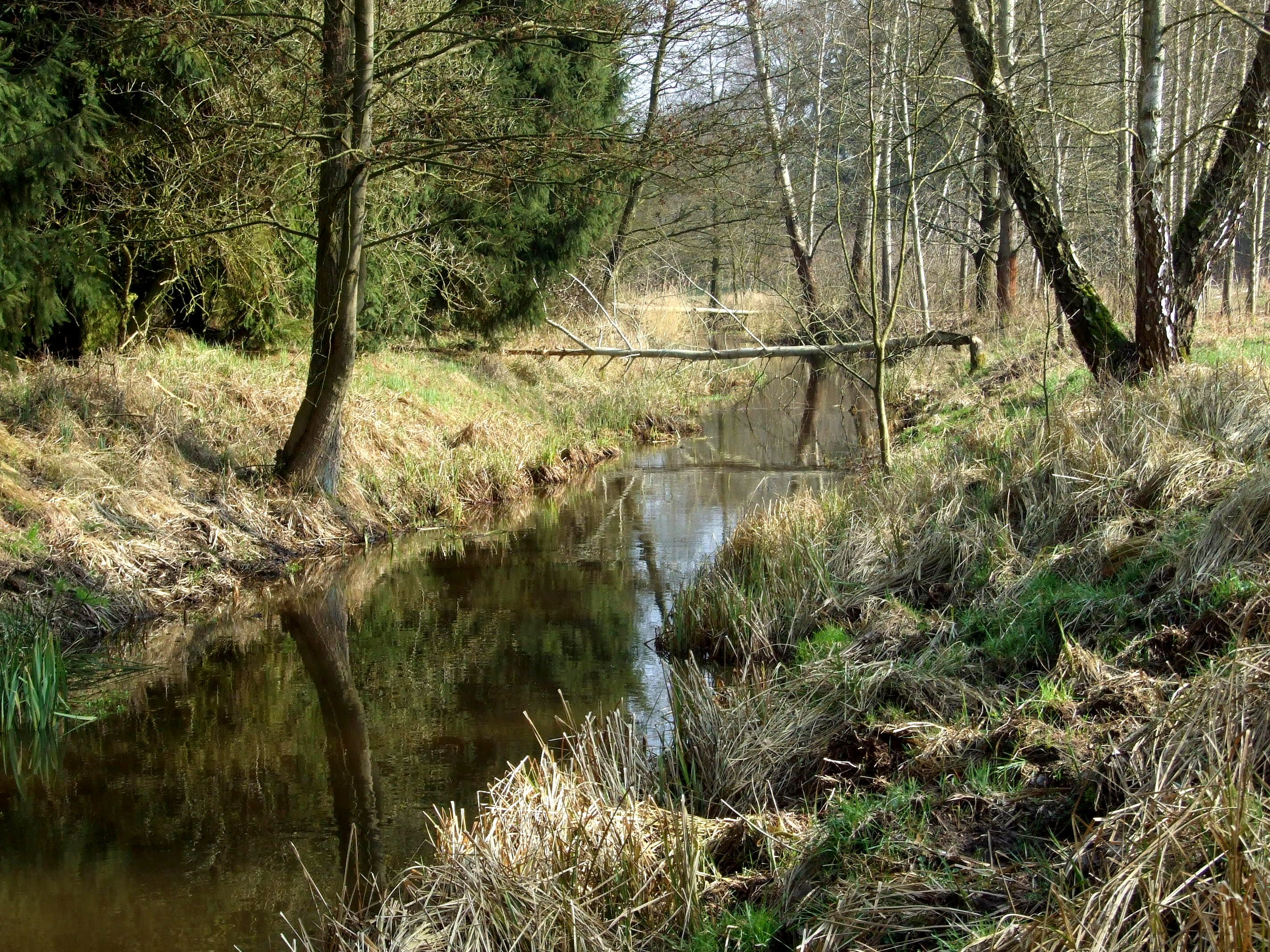 Kanał Wołczkowski